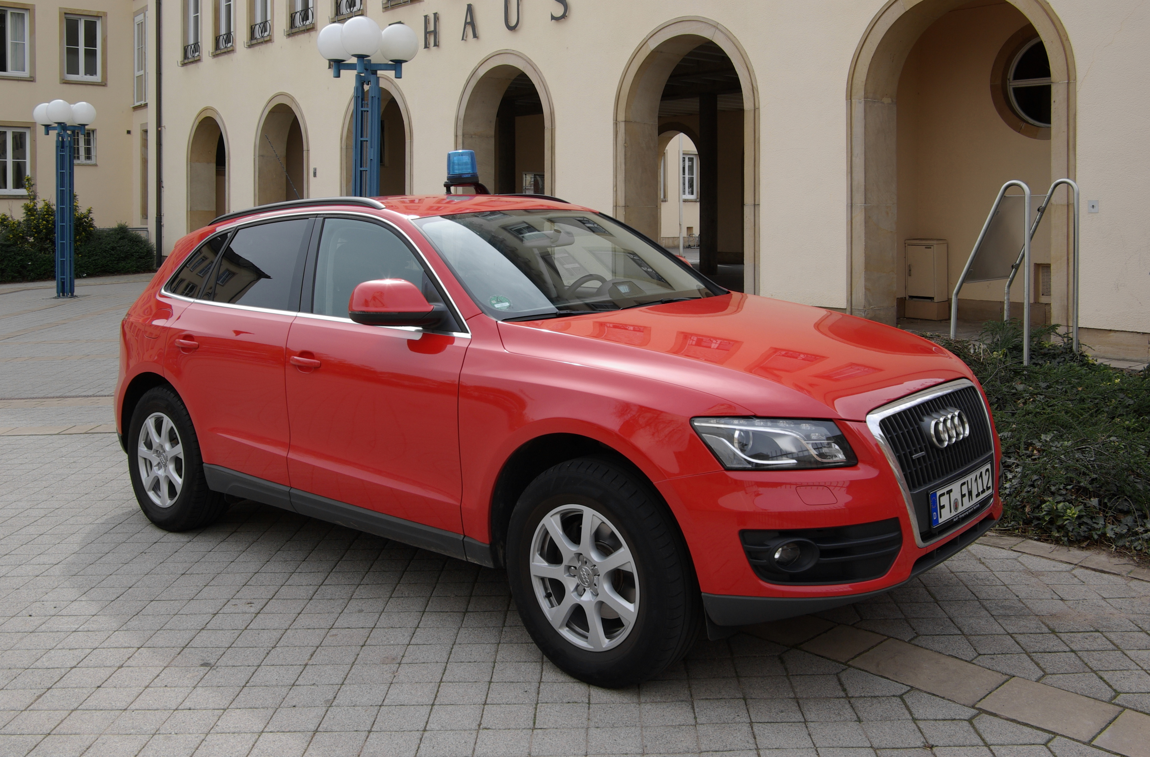 Audi Q5 als Feuerwehrfahrzeug